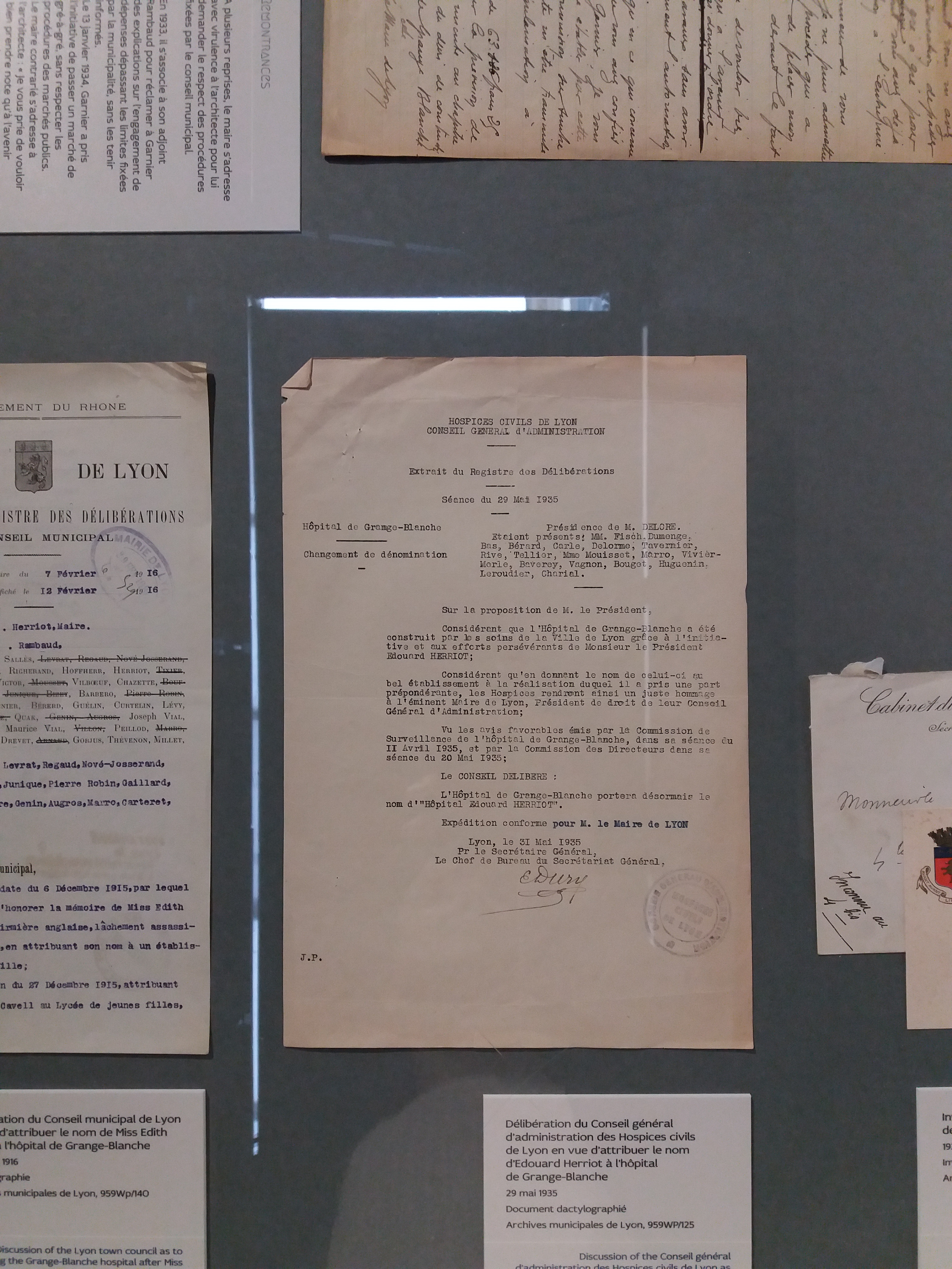 Extrait du Registre des Délibérations, séance du 29 mai 1935. Changement du nom de l'Hôpital de Grange-Blanche en Hôpital Édouard Herriot.